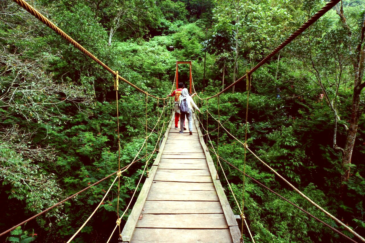 Penggunaan Nama IR Djuanda mengacu kepada tokoh IR Djuanda yang saat itu sangat kontribusi terhadap batas maritim Republik Indonesia. Djuanda kemudian mendeklarasikan ZEE (Zona Ekonomi Ekslusif) atau diknal dengan Deklarasi Djuanda.